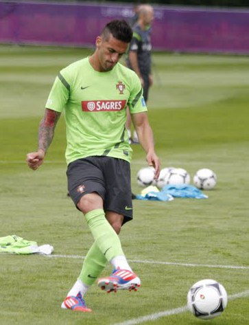 Hugo Miguel Almeida Costa Lopes during a training for Portugal national team before Euro 2012.